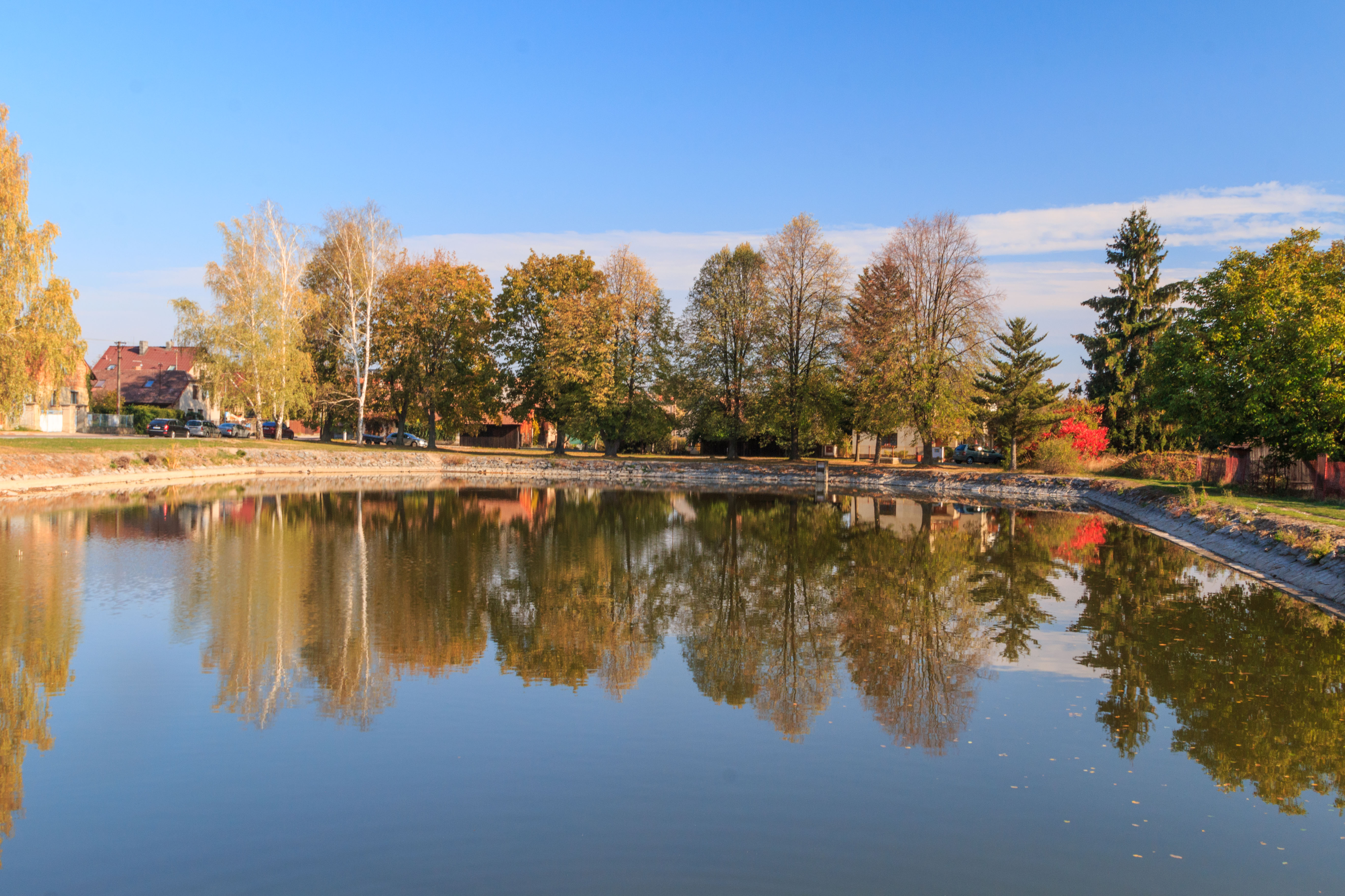 Návesní rybník v Zaječicích Project: Vodstvo Ticket: 1617.